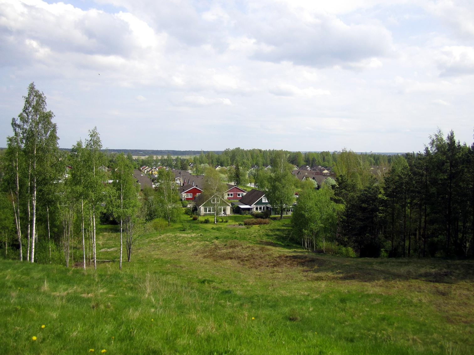 Vy från Lundbykullen, över norra delen av bostadsområdet samt Kåvi ängar i bakgrunden.